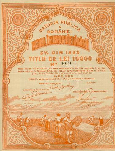 Imaginea unui titlu din Renta Împroprietăriri din anul 1922, semnat de Vintilă Brătianu, România, ca ministru de finanţe